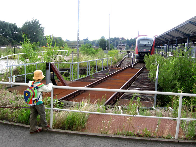 Segment turntable at Zittau station. Segmentdrehscheibe am Bahnhof Zittau Segmentová točna na nádraží v Žitavě